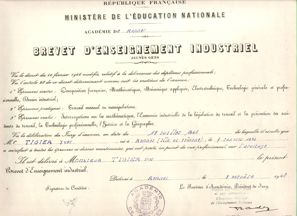 Diplôme du Brevet d'enseignement industriel (délivré en 1948 à Rennes France).